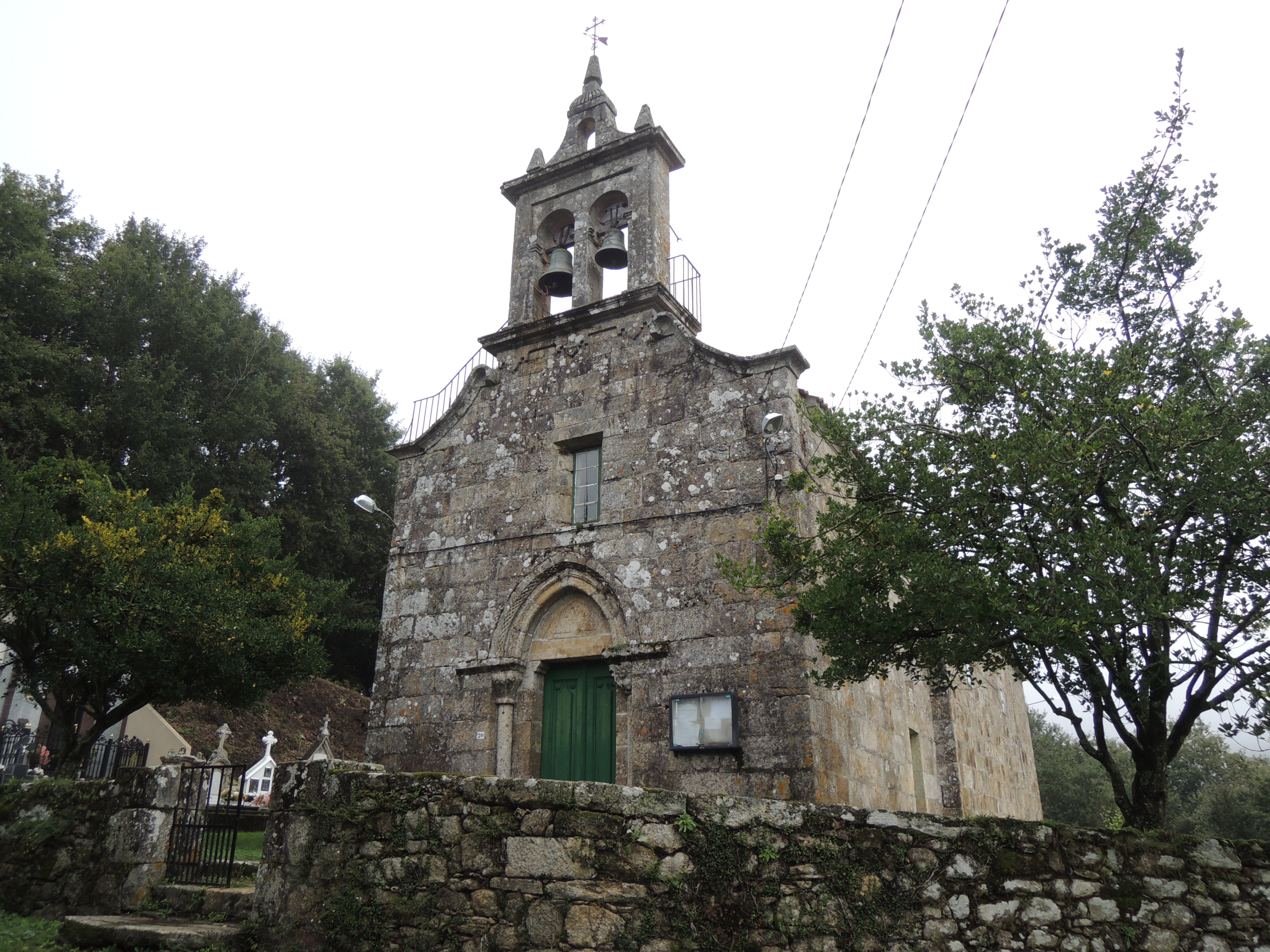 Construida con probabilidad a finales del siglo XII y principios del siglo XIII, tan solo conserva su portada occidental y algunos canecillos en el muro norte.